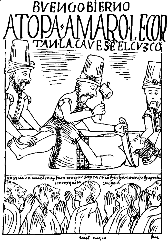 Ejecución del inca Túpac Amaru I, en la plaza del Cuzco, año 1572